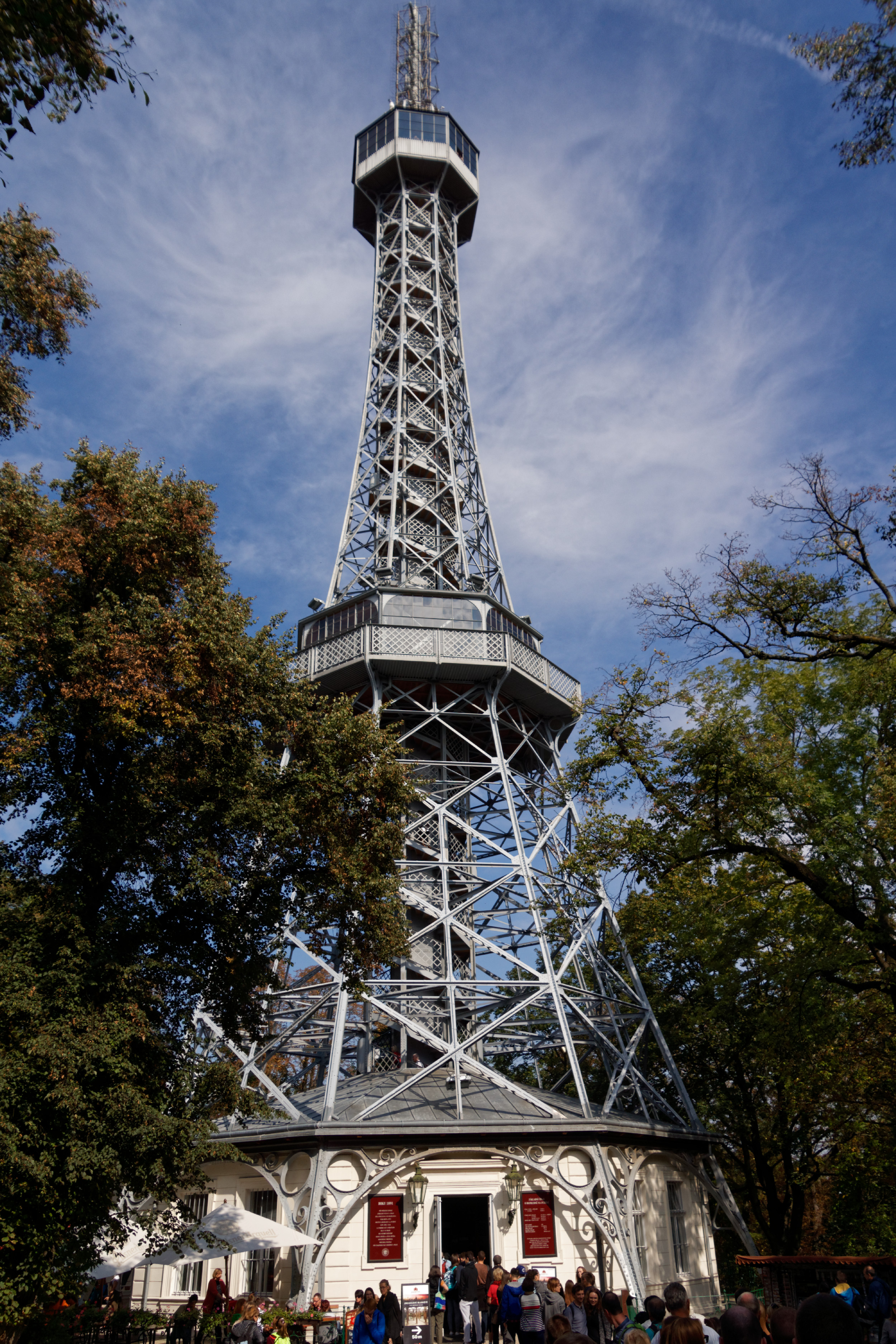 Petřínská rozhledna, Prague, 2016